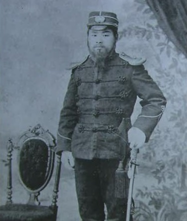 대한제국 박승환 참령